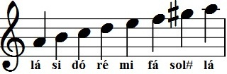 Arquivo montado no MuseScore e editado no Paint.